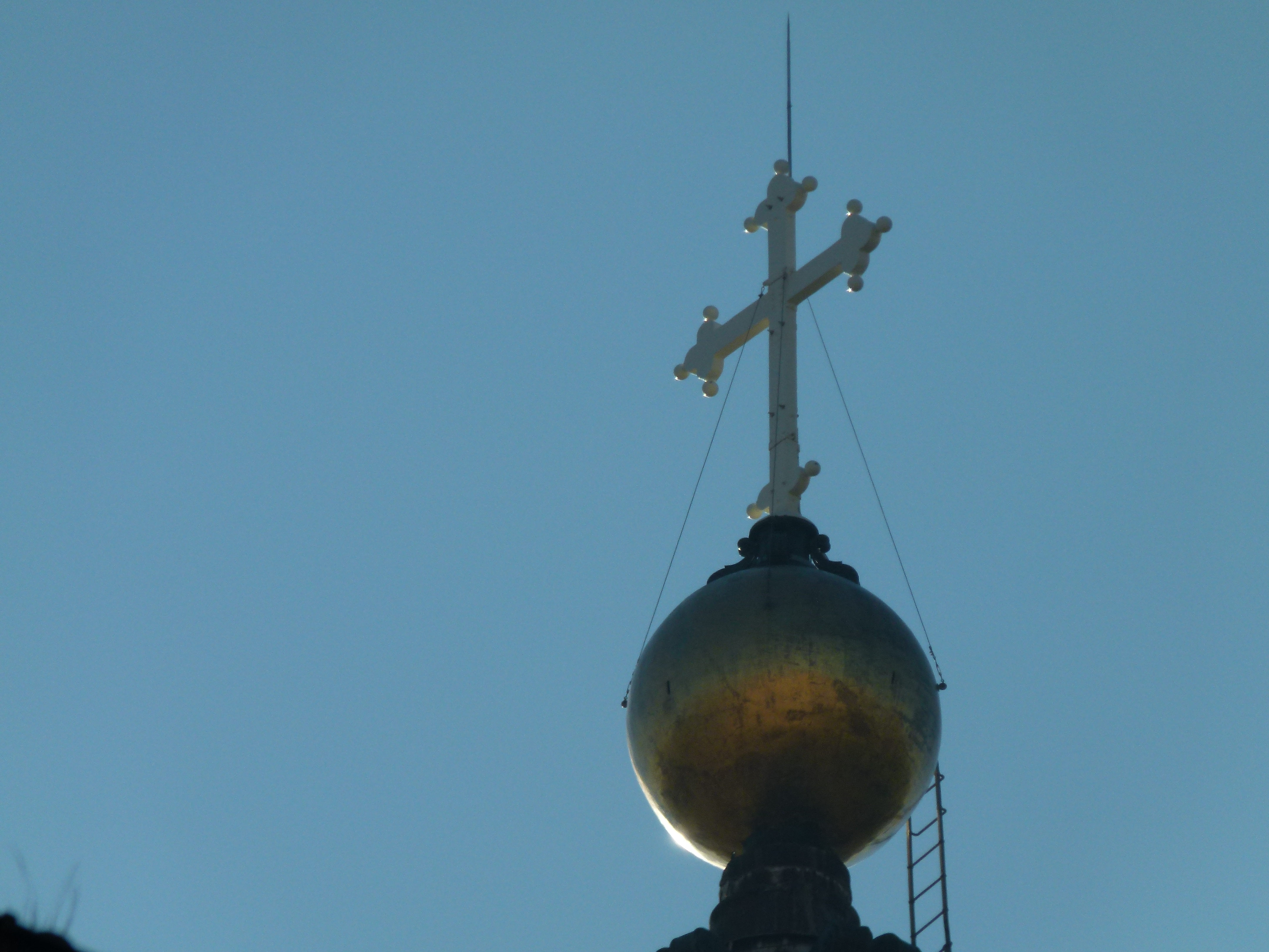 This photo was taken with Panasonic Lumix DMC-FZ100 camera, thanks to Panasonic.You can see all photographs in category: Taken with Panasonic Lumix DMC-FZ100.